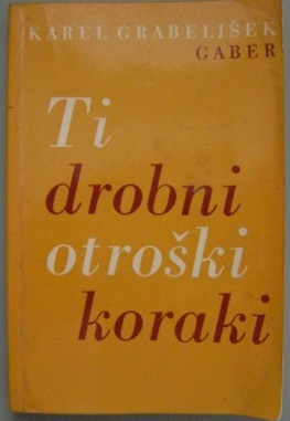 Ti drobni otroški koraki naslovnica